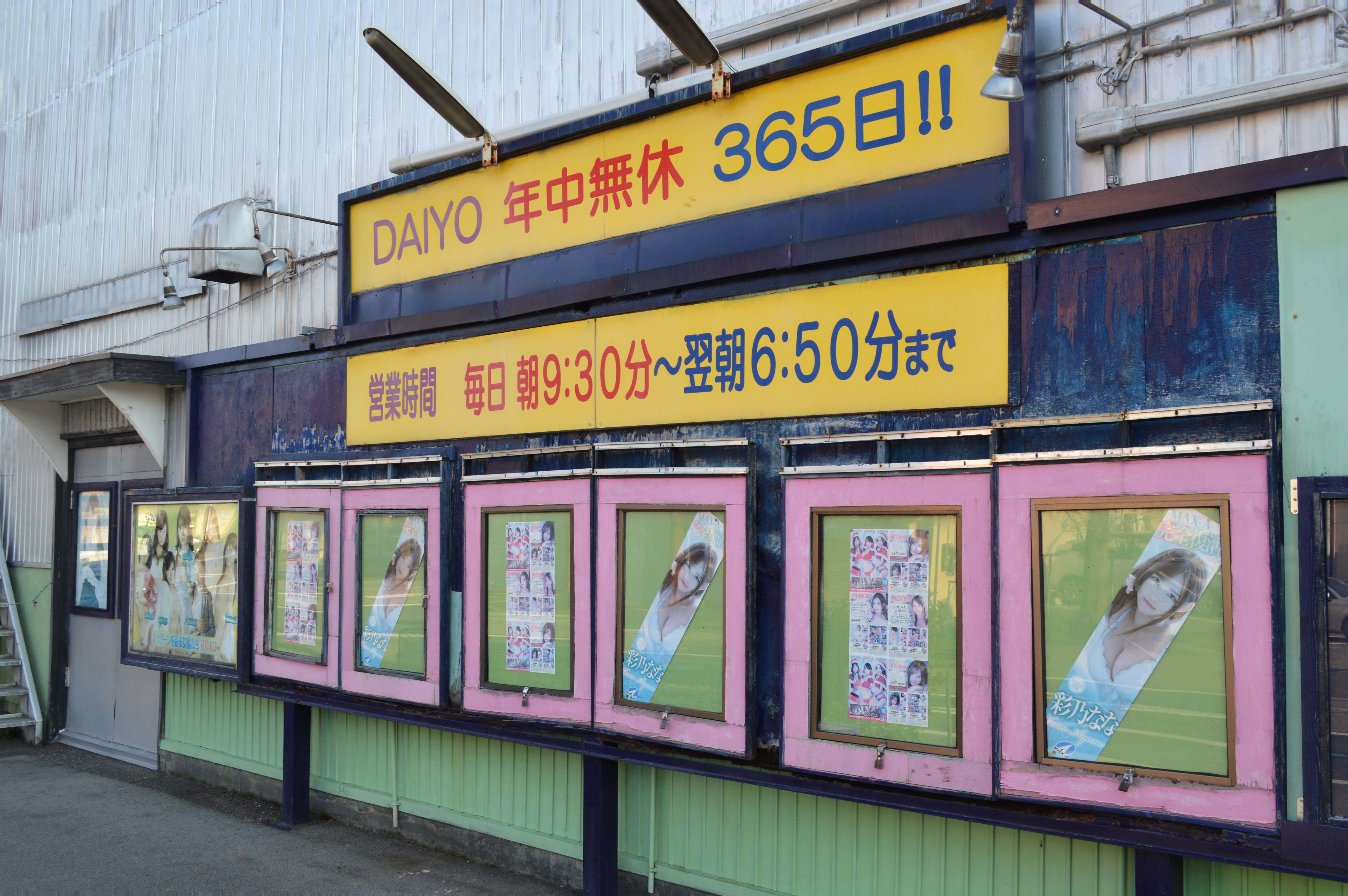 新潟県新潟市中央区古町通12番町にある映画館「映劇大要」。